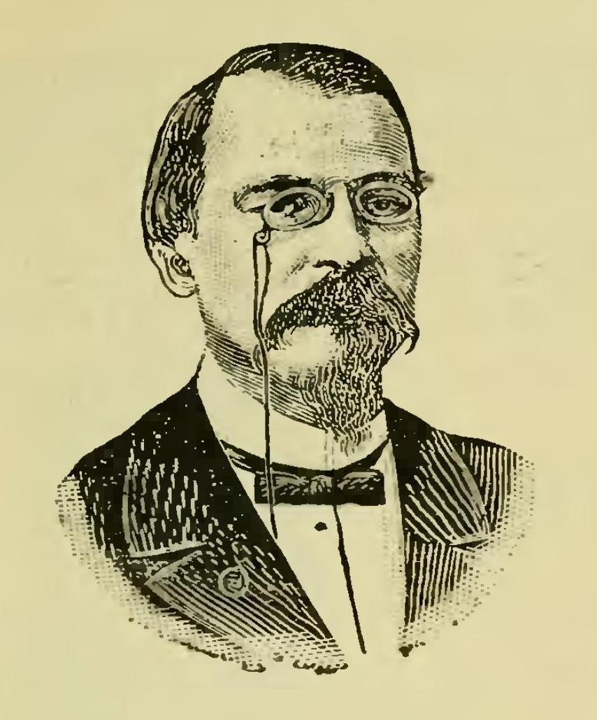 Benjamin Constant, político brasileiro, c. 1903